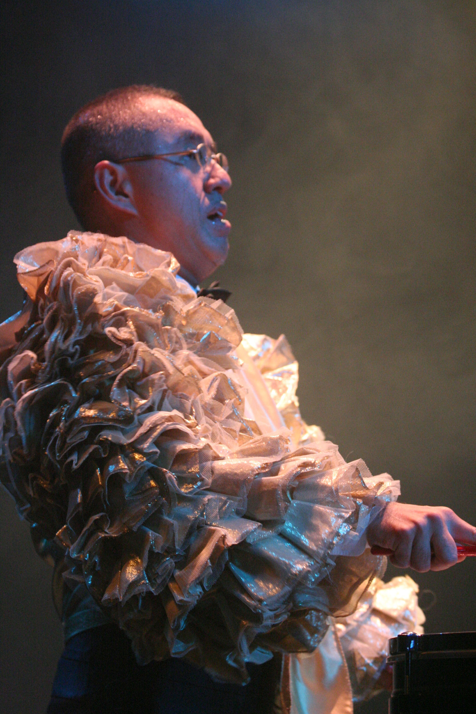 Tokyo Panorama Mambo Boys